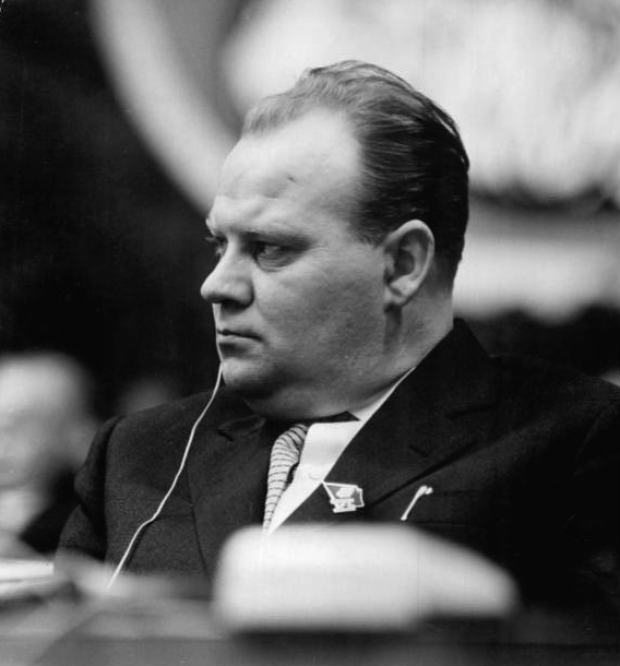 Zentralbild Kollektiv 15.1.1963 VI. Parteitag der SED vom 15.-21.1.1963 in der Werner-Seelenbinder-Halle in Berlin (1.Tag) UBz: Im Präsidium das Mitglied des Präsidiums des ZK der KP der Tschechoslowakei Drahomir Kolder (Sturm)